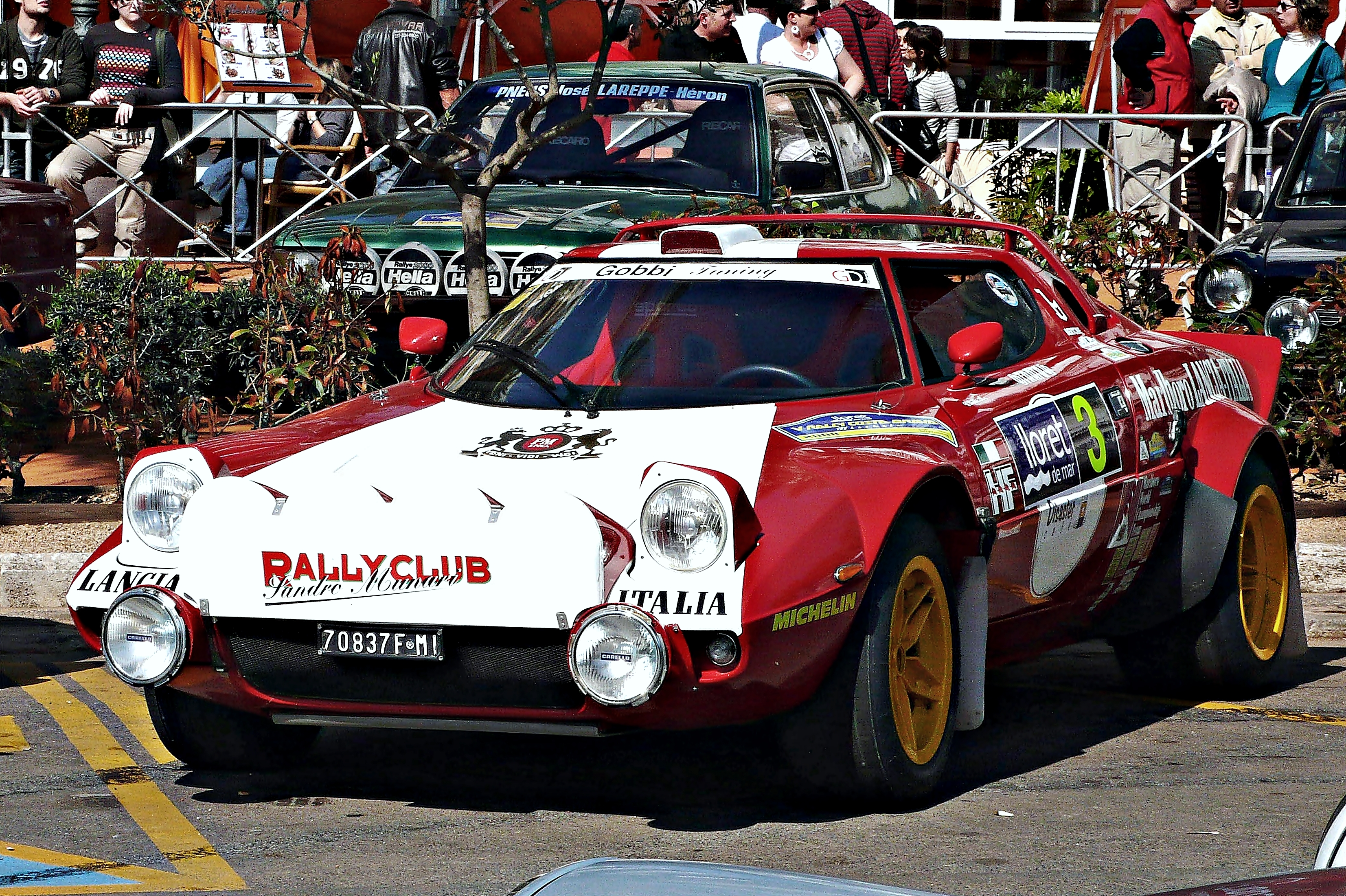 stratos rallye costa brava